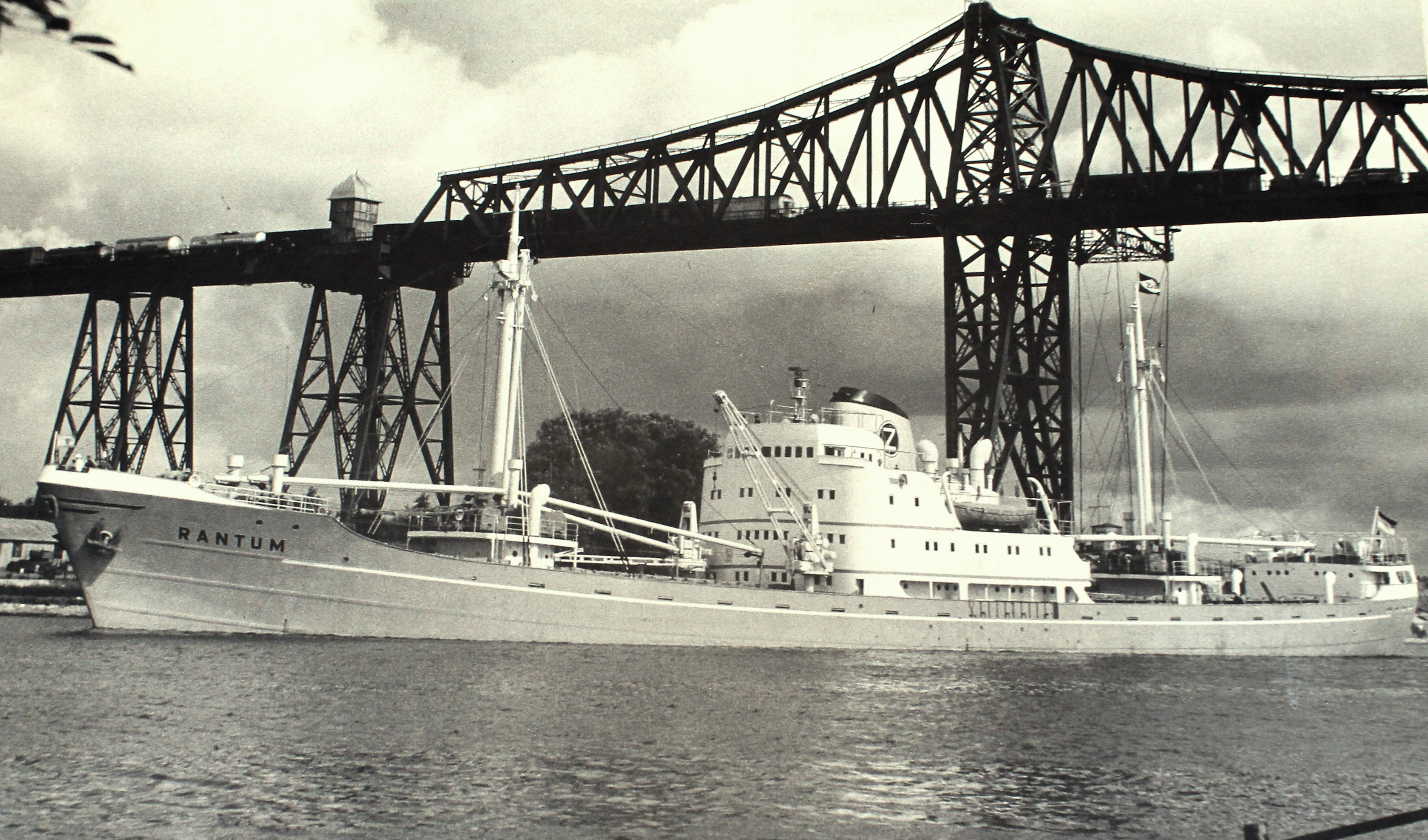 Rantum, ein Frachter der Nobiskrug Werft